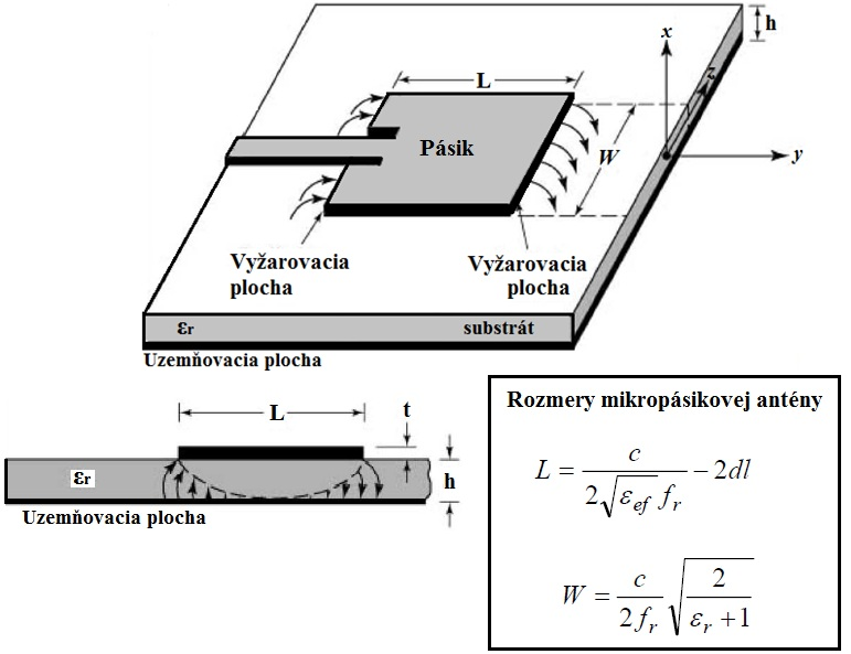 Tento obrázok opisuje rozmery mikropásikovej antény